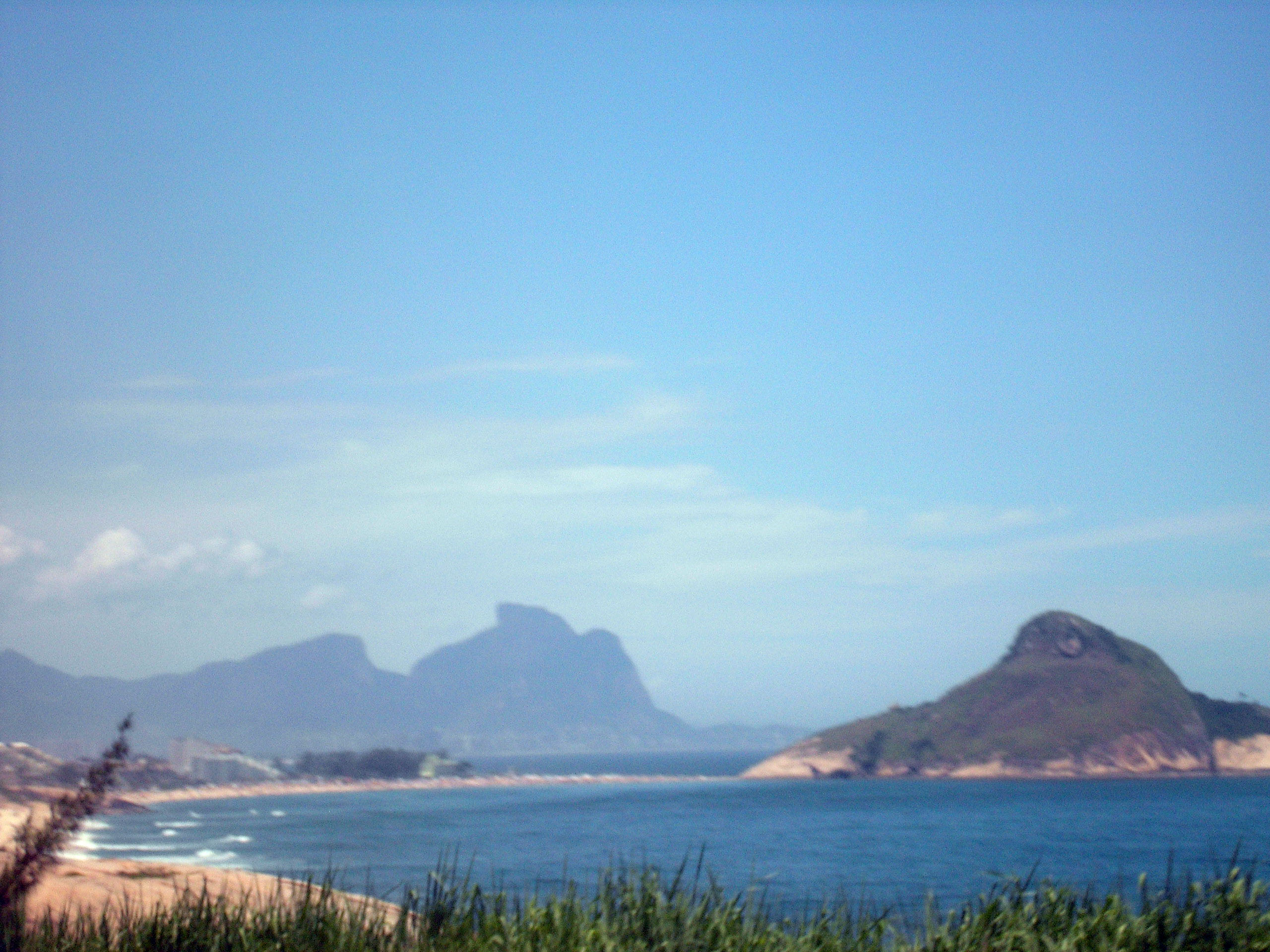 Foto de uma praia no Rio de Janeiro (Praia do Pontal, Barra da Tijuca)